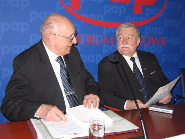 Władysław Bartoszewski (Warsaw, 19.02.1922, - Warsaw, 24.4.2015), Polish historian, publicist, writer and diplomat and Lech Wałęsa (b. 1943), Polish politician, Peace-Nobel Prize laureat